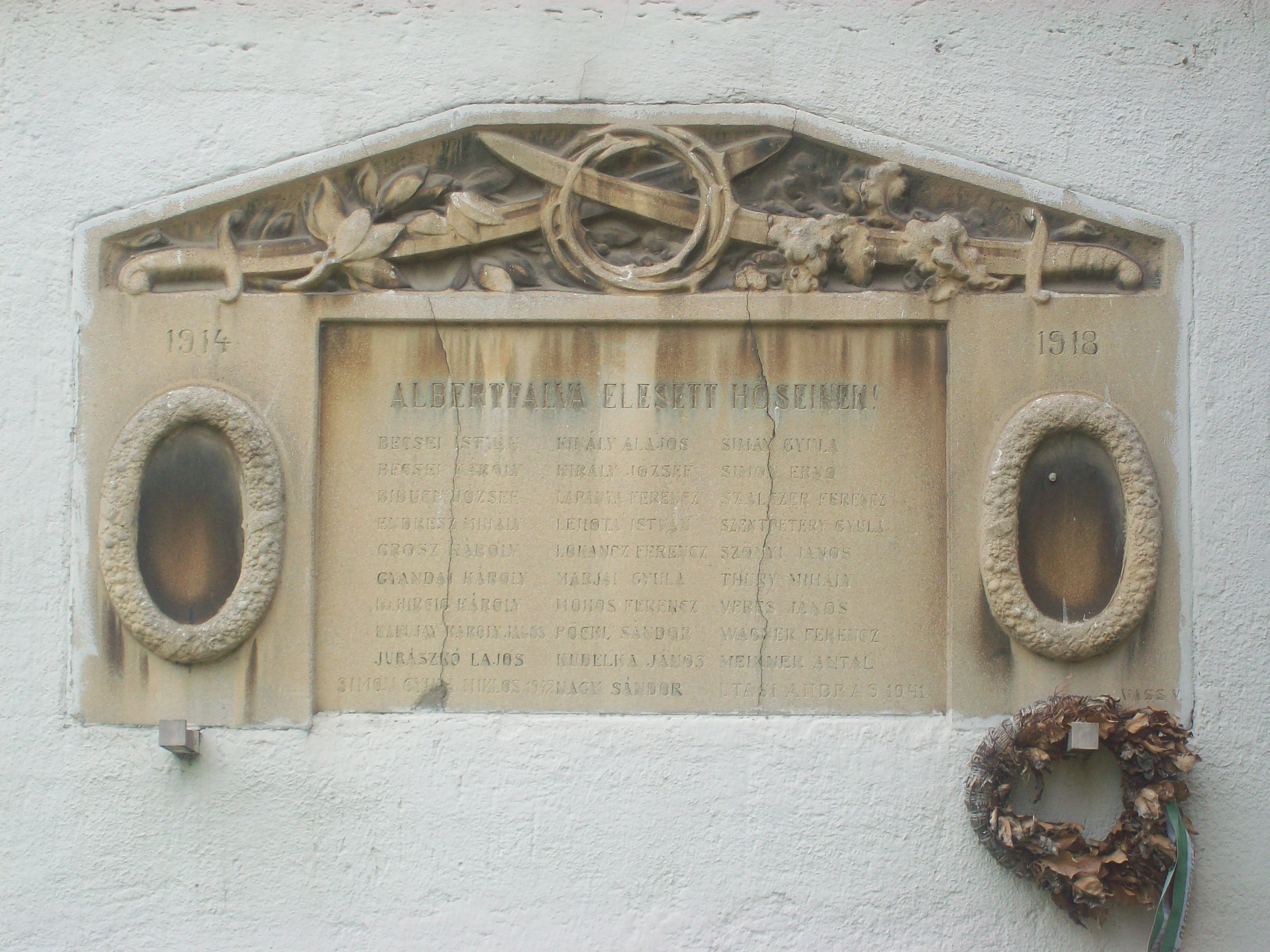 Albertfalva első világháborúban elesett hőseinek emléktáblája az Albertfalvi Cérnázógyár épületének falán. Budapest XI. kerület, Fehérvári út 219. Alkotó: Vass Viktor, 1941.